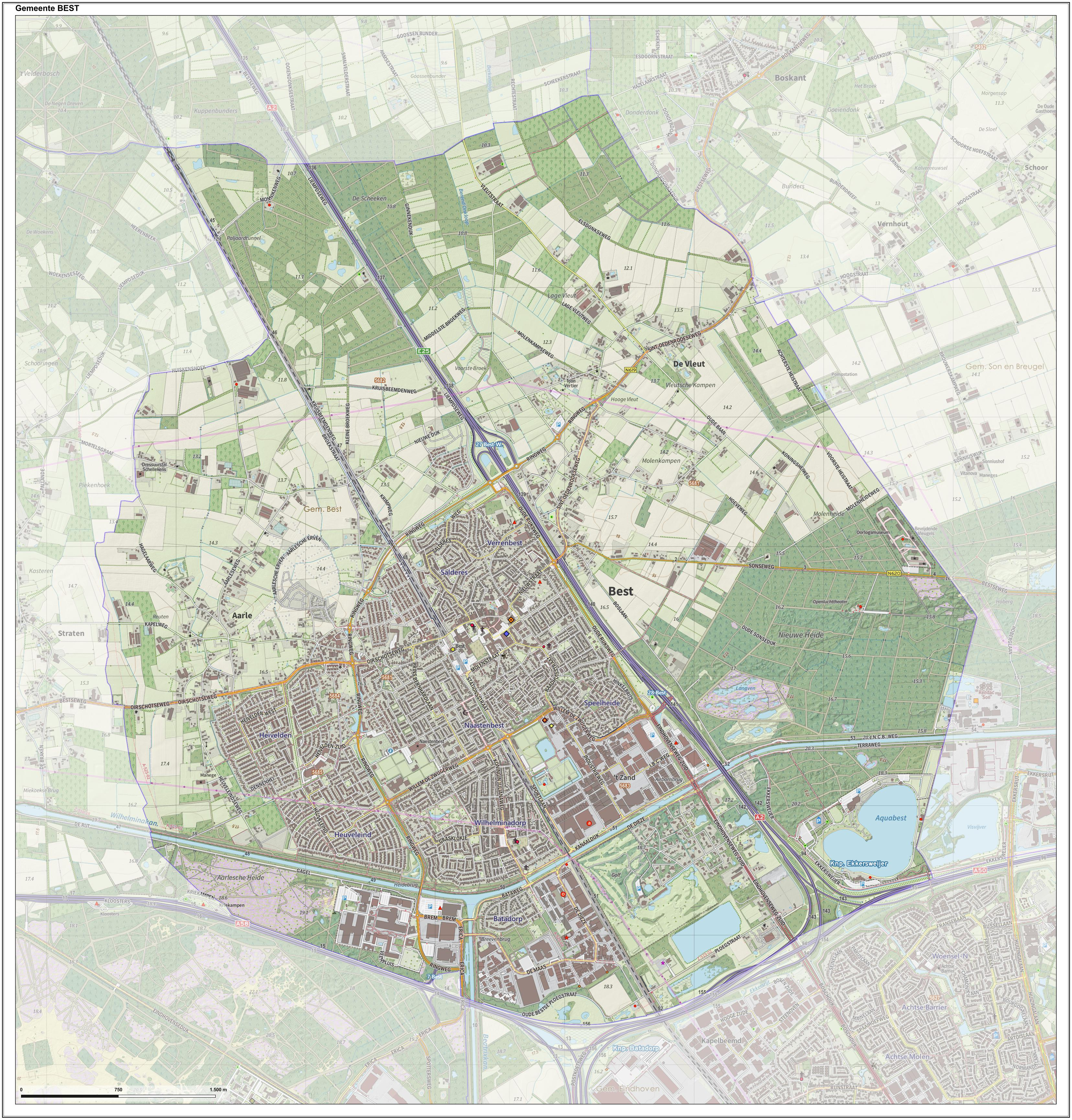 Topografische gemeentekaart. Resolutie: 400 pixels/km. Kaartbeeld samengesteld uit de open geodata van de Top10NL en Top25namen (BRT), Creative Commons BY licentie. Gebouwvlakken uit open geodata BAG extract. Wegen uit de OpenStreetMap, OpenStreetMap community. Schaduwreliëf uit de Actuele Hoogtekaart AHN2. Samenstelling en kleurenschema: Jan-Willem van Aalst, met QGIS2. Zie ook de Legenda.